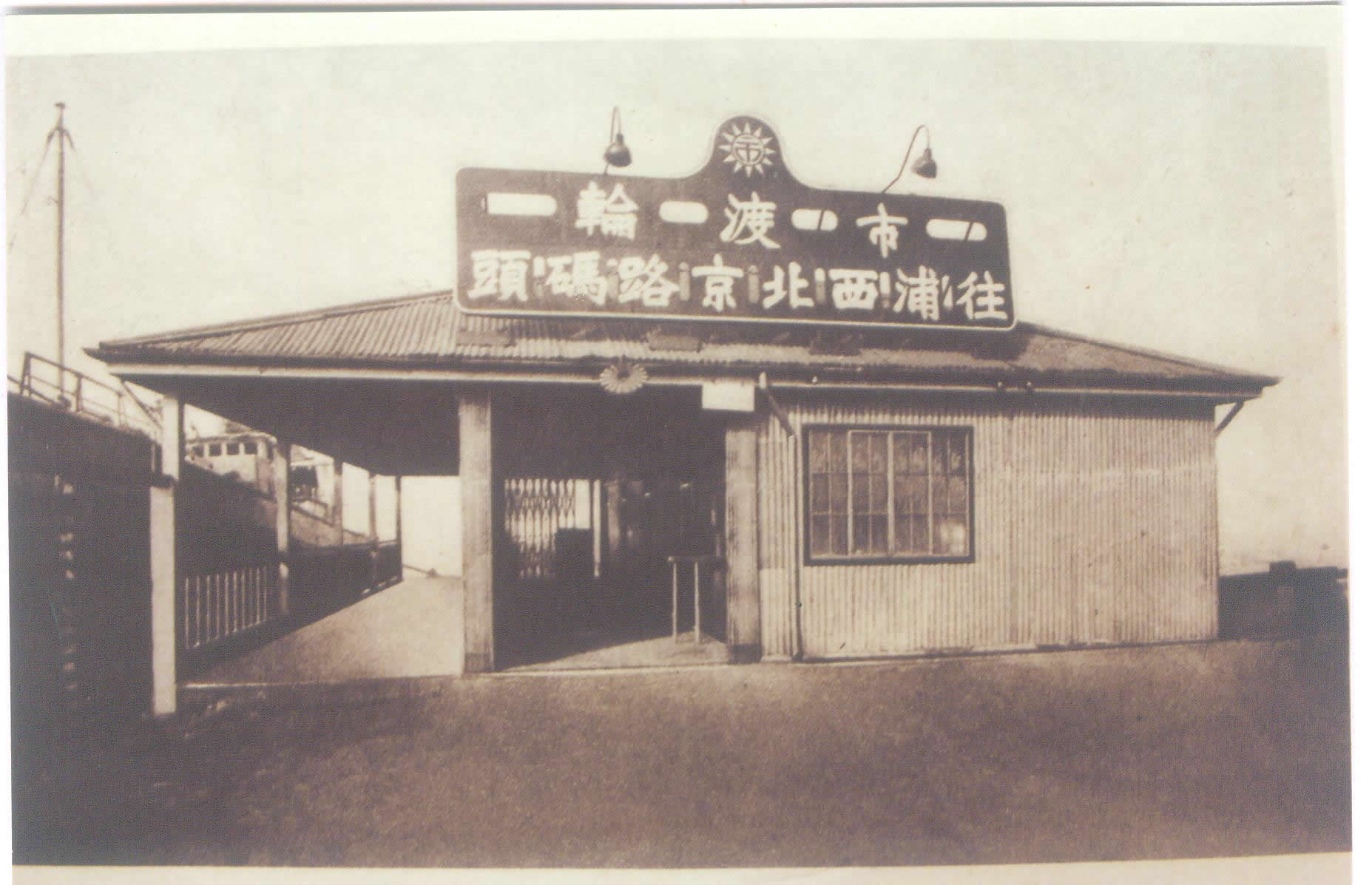 中文（中国大陆）: 1949年以前的东昌路轮渡站